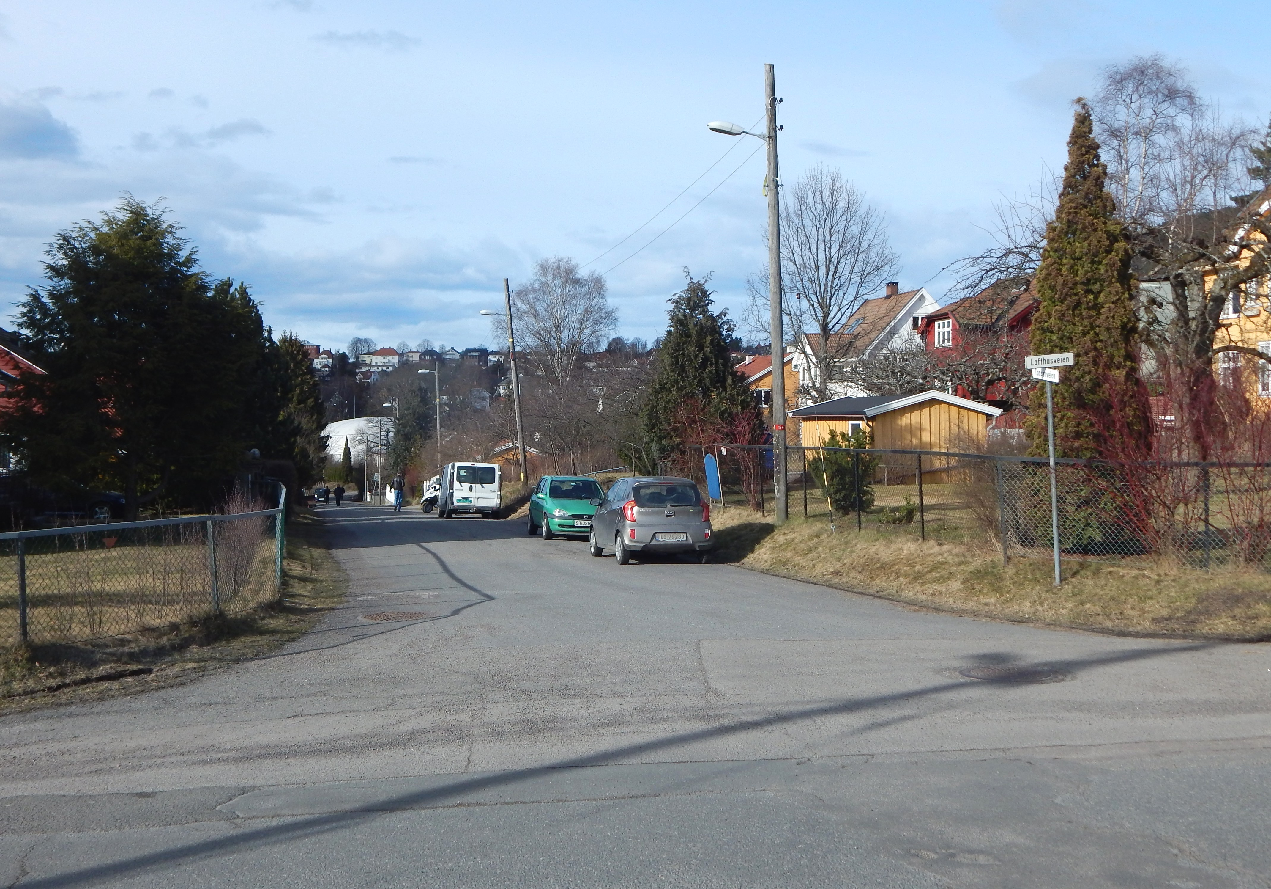 Tonsenveien sett fra Lofthusveien